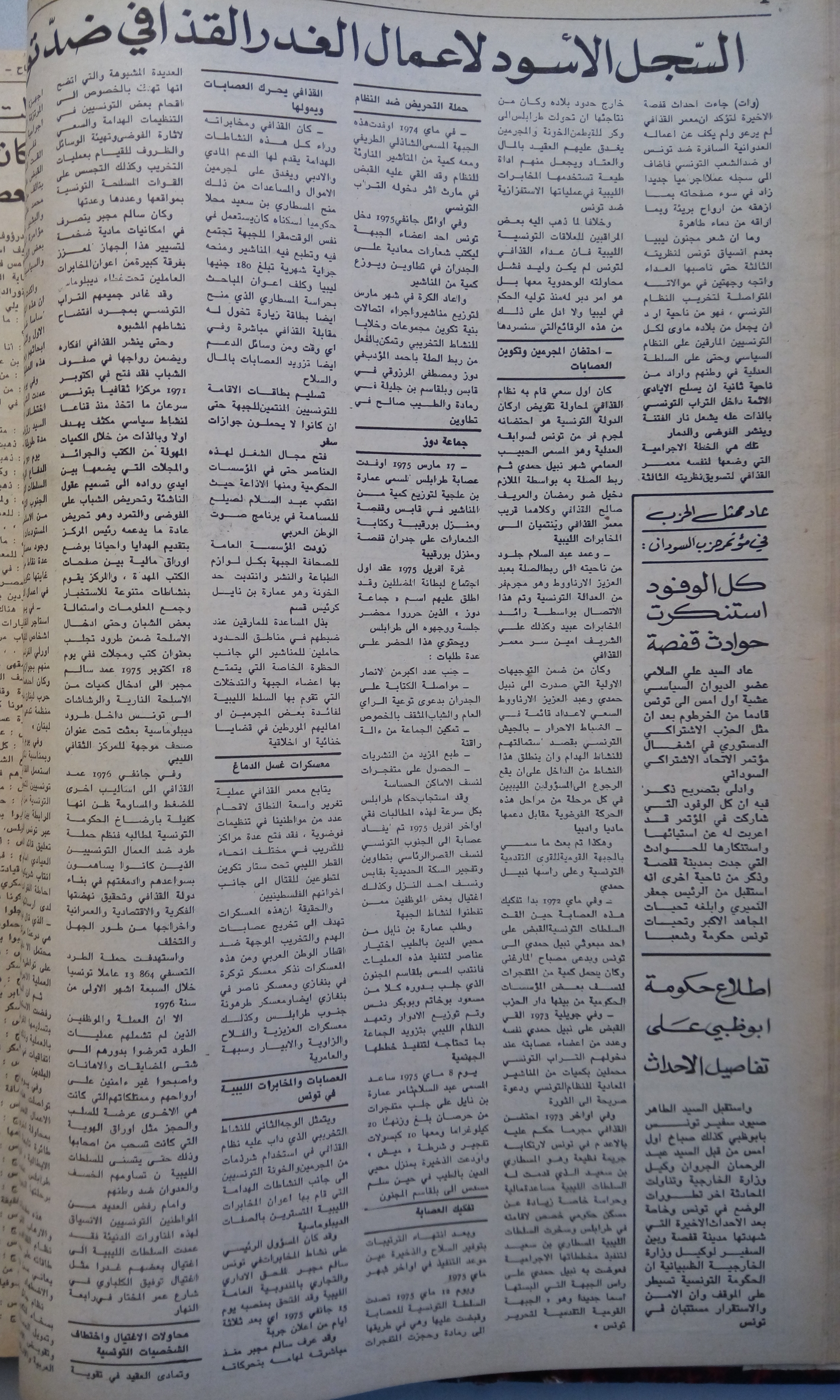 Assabah 1980